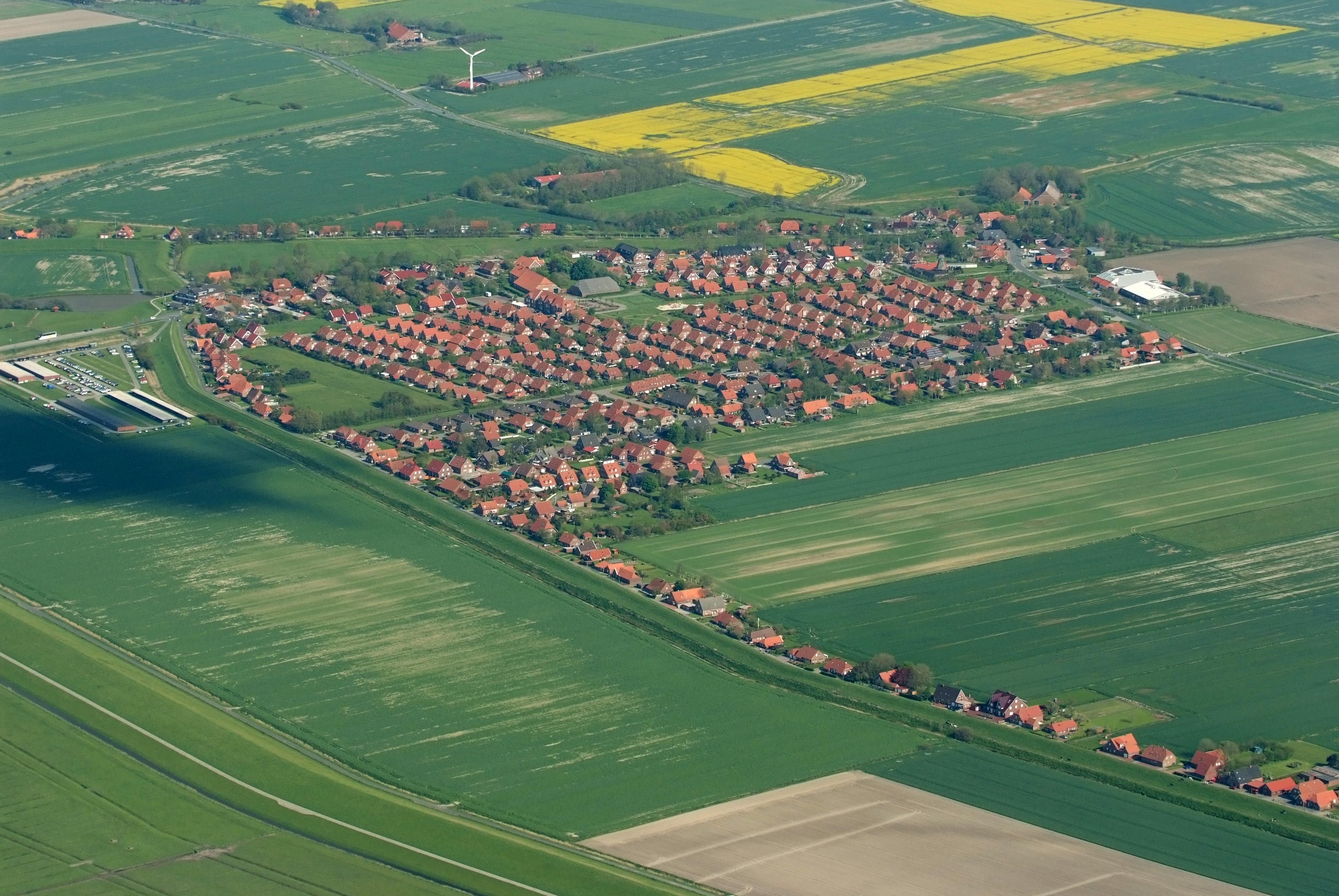 Neßmersiel Fotoflug vom Flugplatz Nordholz-Spieka über Bremerhaven, Wilhelmshaven und die Ostfriesischen Inseln bis Borkum